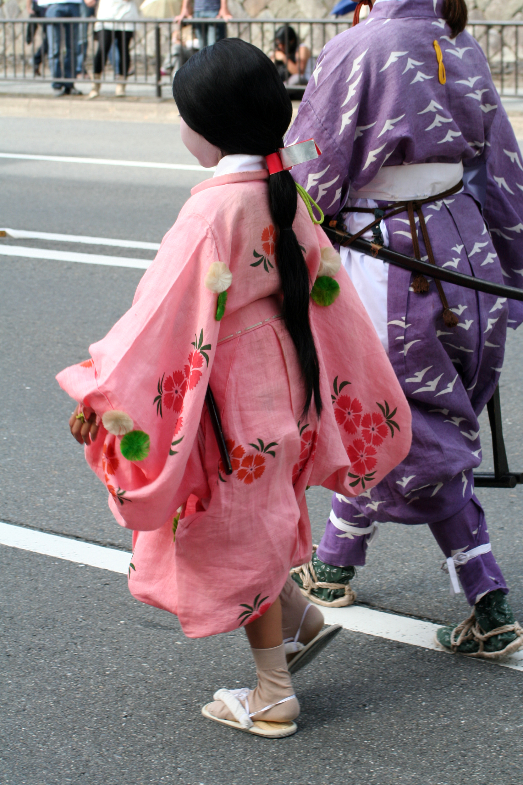 京都府京都市にて開催された時代祭。正午の御所から平安神宮までの行進の様子。2009年10月22日撮影。